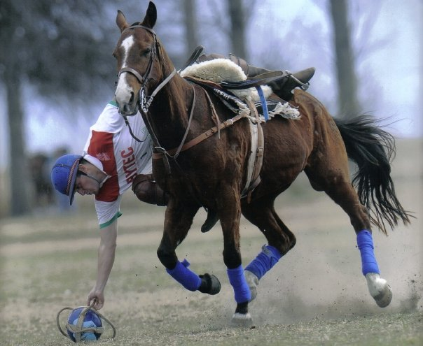 El Pato